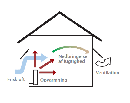 Opvarmning og ventilation.